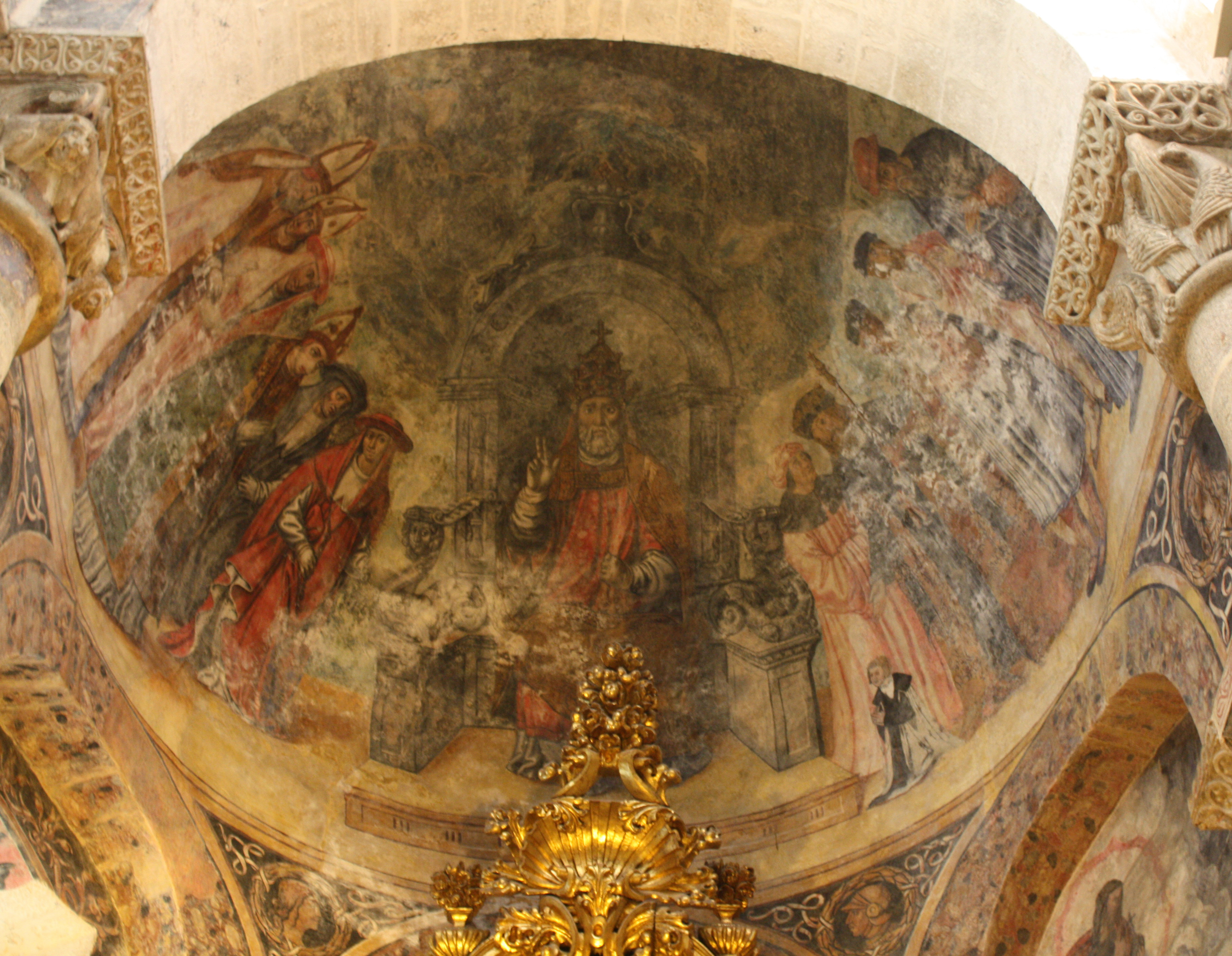 Pinturas murais na capela da Azucena ou de San Pedro, na Catedral de Santiago de Compostela.